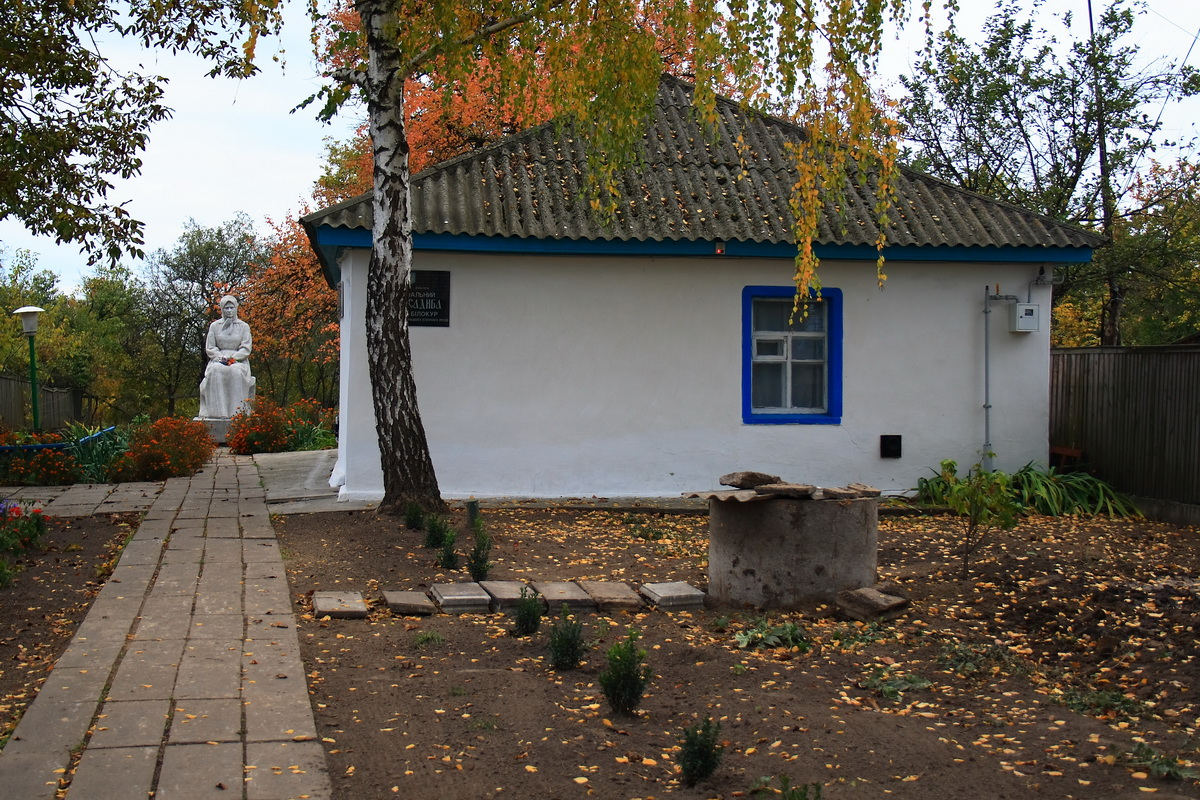 Село Богданівка, Яготинський район, Київська область. Музей-садиба Катерини Білокур.